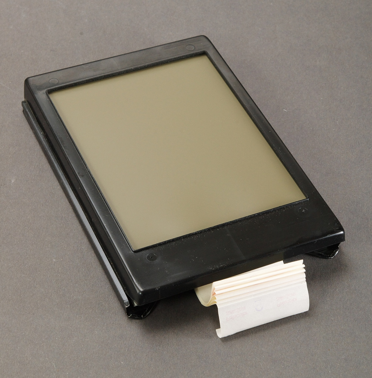 Polaroid Filmpack, geöffnet